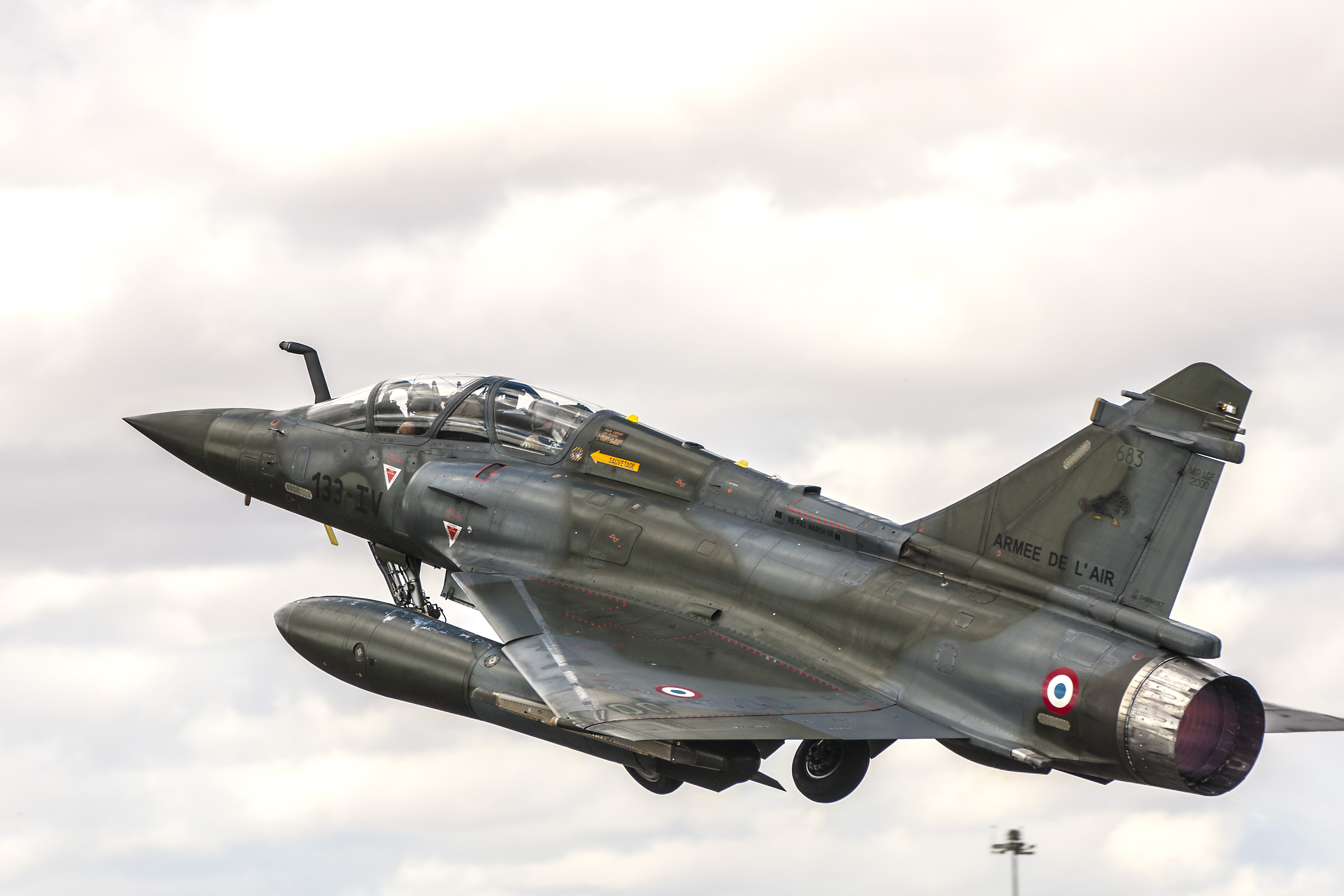 Fotos tomadas durante la primera jornada del TPL2013-5 SpottingDay